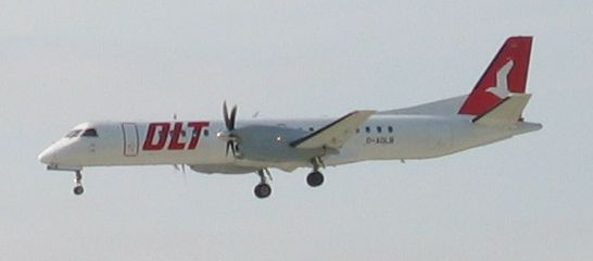 Eine Saab 2000 der OLT Ostfriesische Lufttransport GmbH im Anflug auf Hamburg-Finkenwerder.